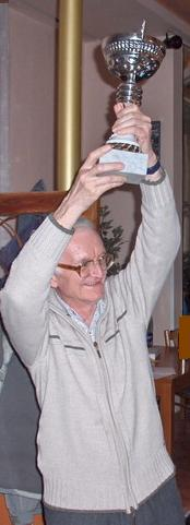 Pavel Mokráň, víťaz Karpatského pohára 2007